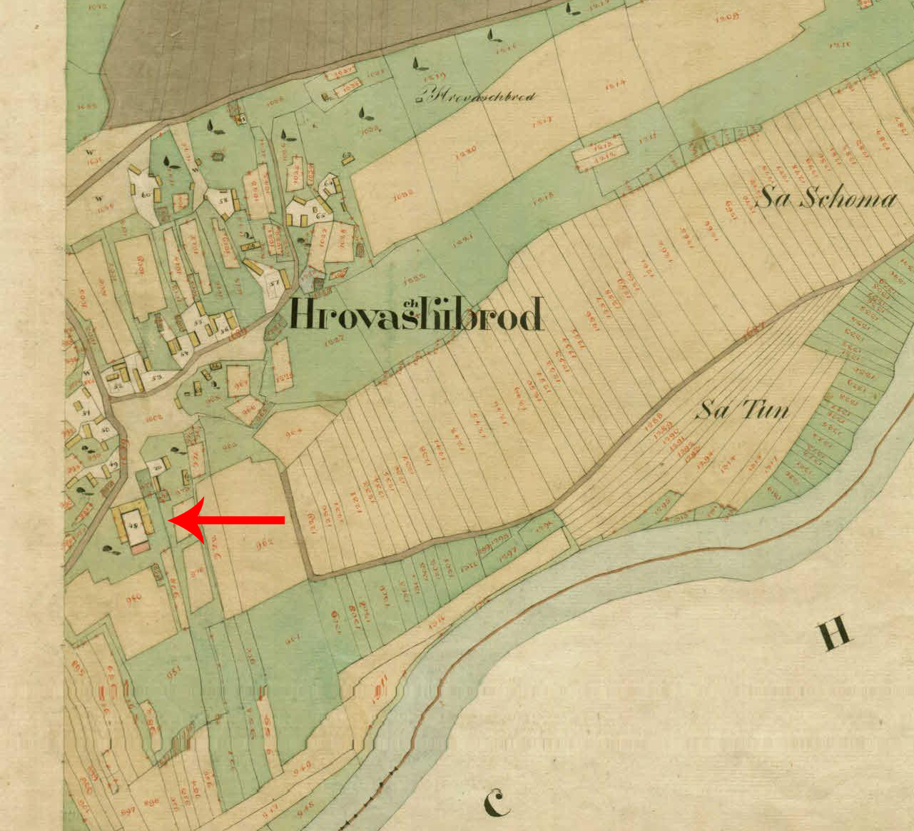 Dvor Otok na franciscejskem katastru za Kranjsko